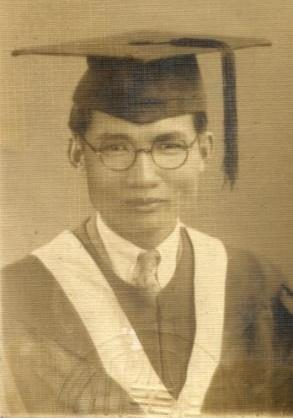 这是黄现璠的毕业照，由身份不明的摄影师拍照于1932年8月，早已进入公共领域。